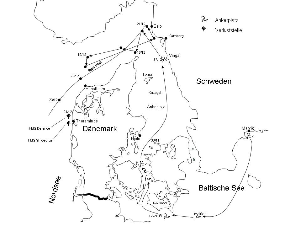 Die letzte Fahrtroute der HMS St. George und HMS Defence